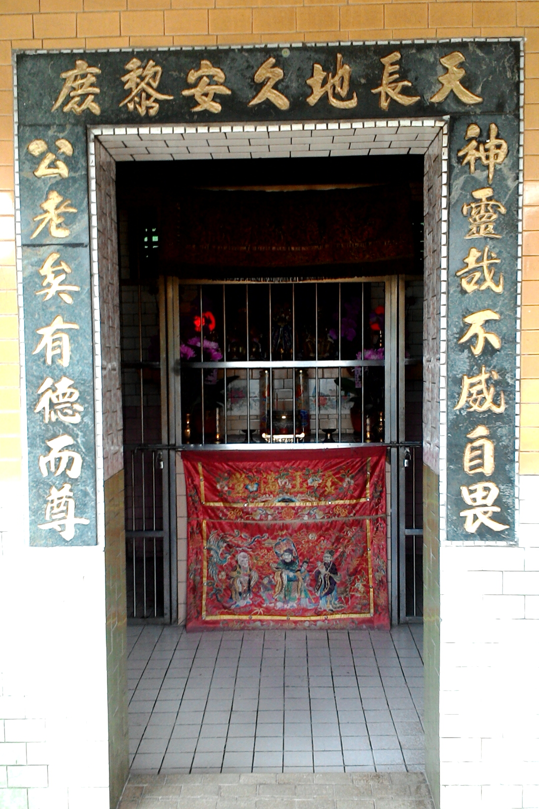 福佑宮對聯與入口,台北市內湖區金龍次分區秀湖里